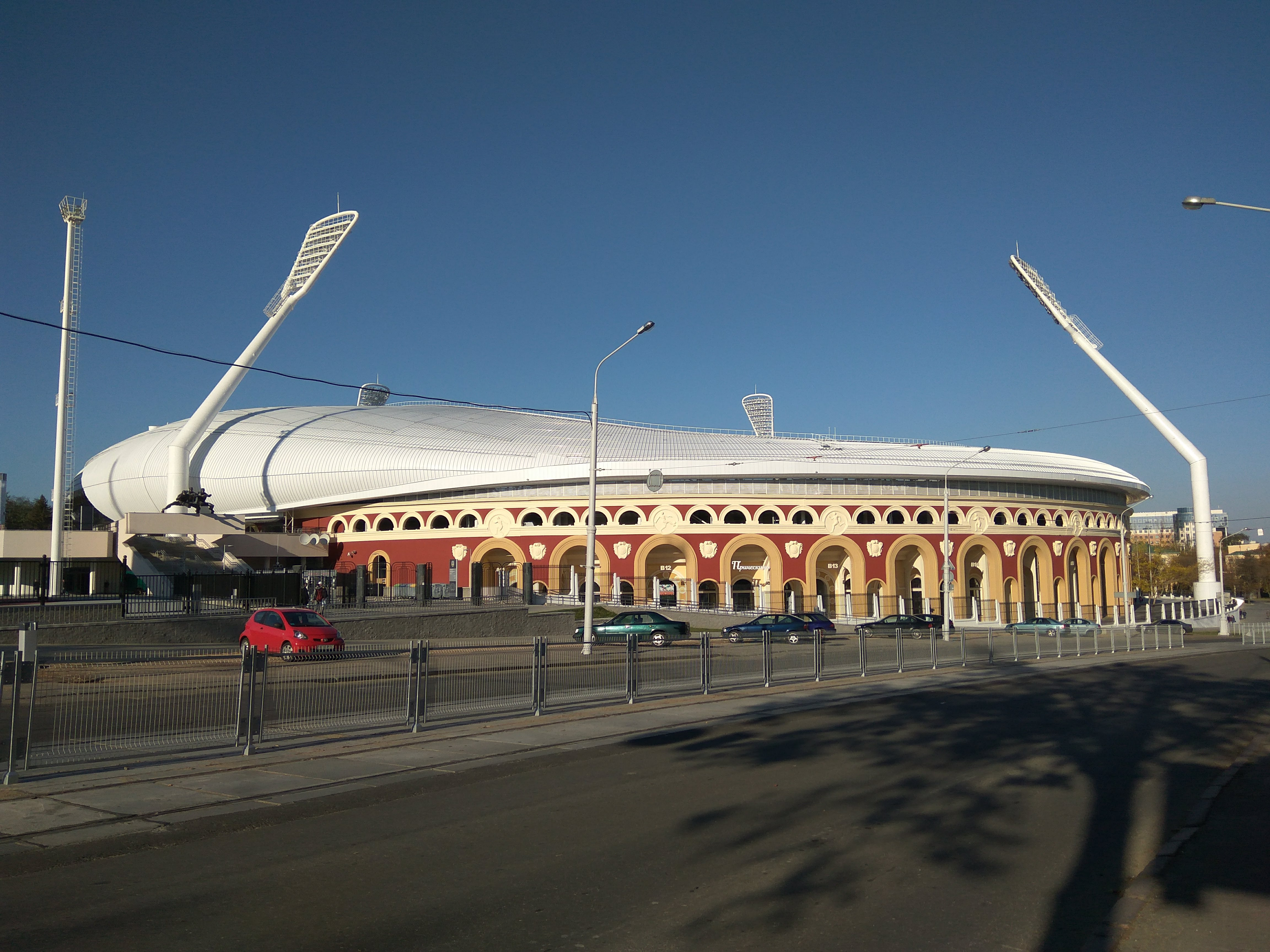 Мінск. Вуліца Ульянаўская (кастрычнік 2018)